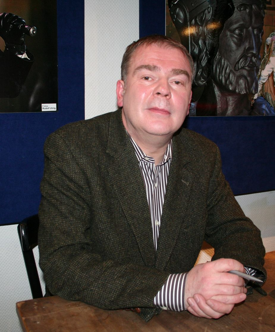 Schriftsteller Max Goldt nach einer Lesung im Wormser Lincoln-Theater